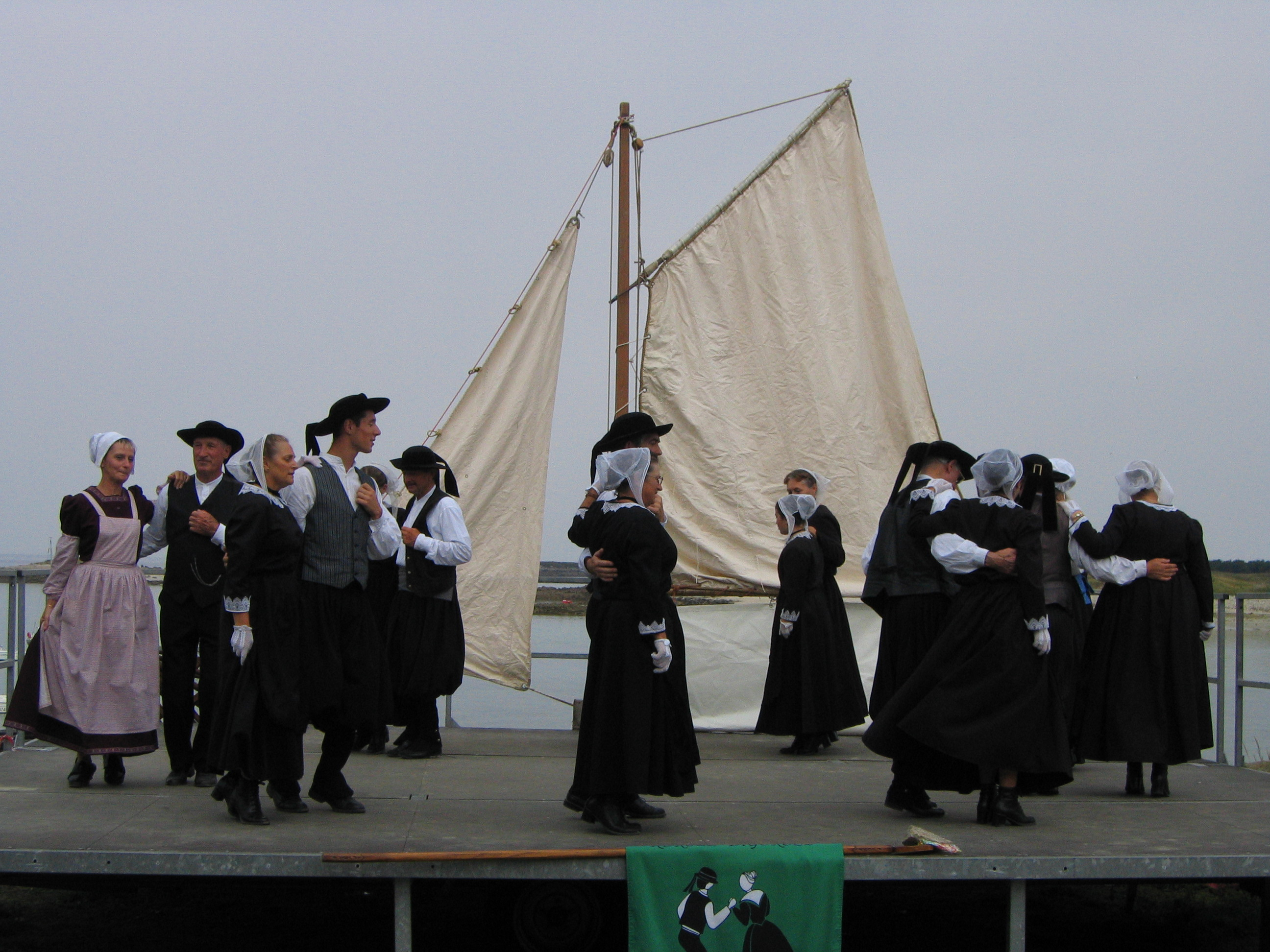 Spectacle de danse bretonne